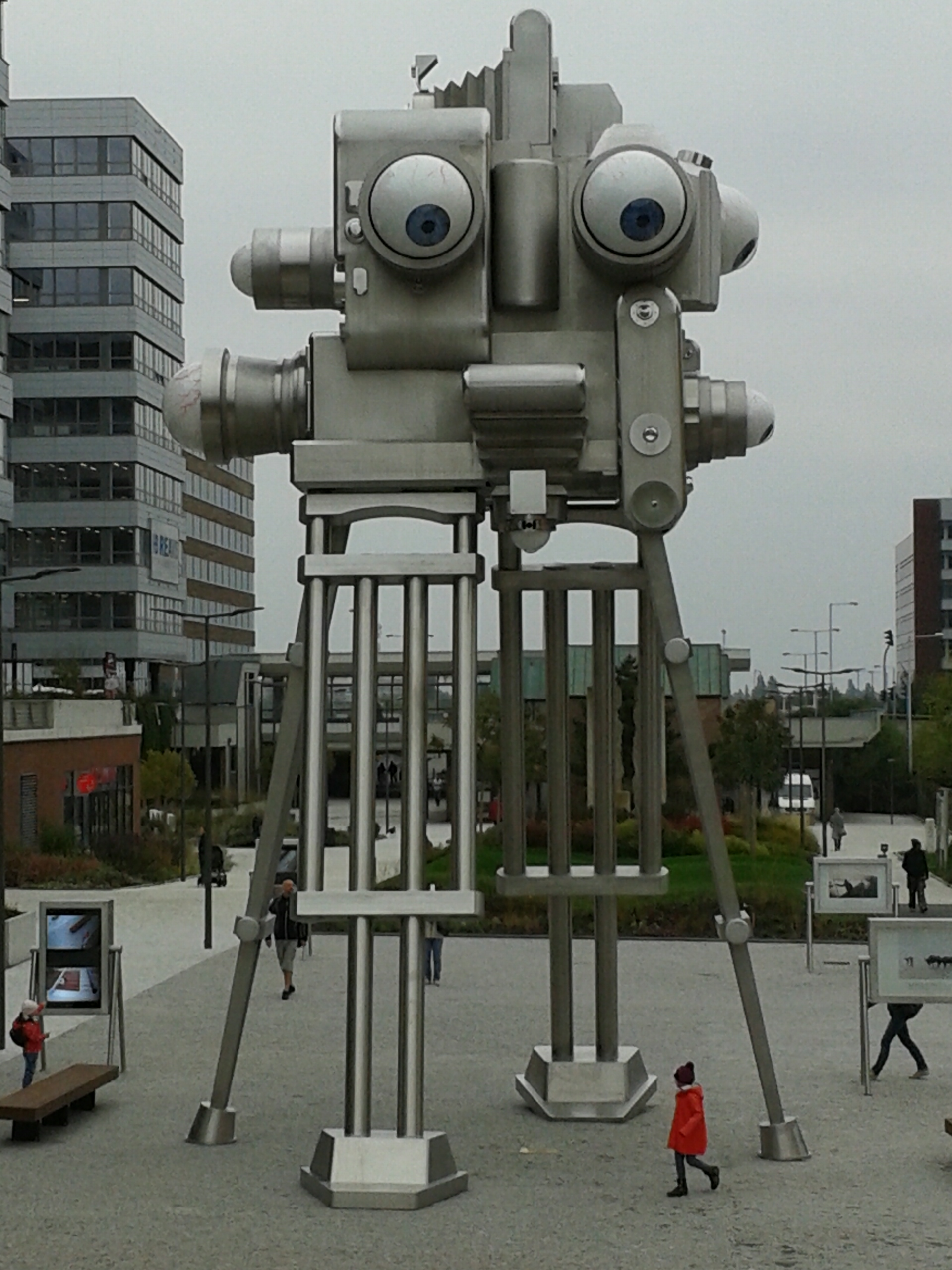 Kinetická socha Davida Černého - kráčející orwelovské monstrum - "Trifot" byla instalována začátkem října 2016 (odhalena 14. řjna 2016) v těsné blízkosti pražské stanice metra Nové Butovice. Instalace stojí před novou galerií Czech Photo Centre, které by měla prezentovat současné domácí i světové umění s důrazem na fotografii a video. Obří bulvy na dvanáctimetrové nerezové konstrukci Trifota sledují kolemjdoucí chodce a jejich obraz se na moment objeví na šesti obrazovkách rozmístěných na volnočasové zóně kolem monumentální plastiky. Galerii i venkovní prostor s Trifotem financovala stavební společnost Trigema.